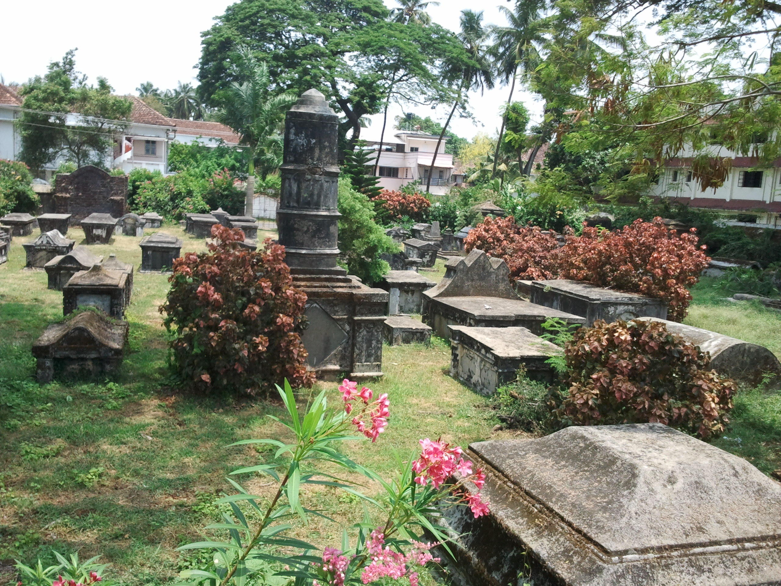 Dutch's Cemetery in Fort Kochi Ernakulam